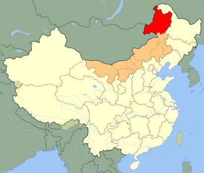 Localizacion de la prefectura de Hulunbuir